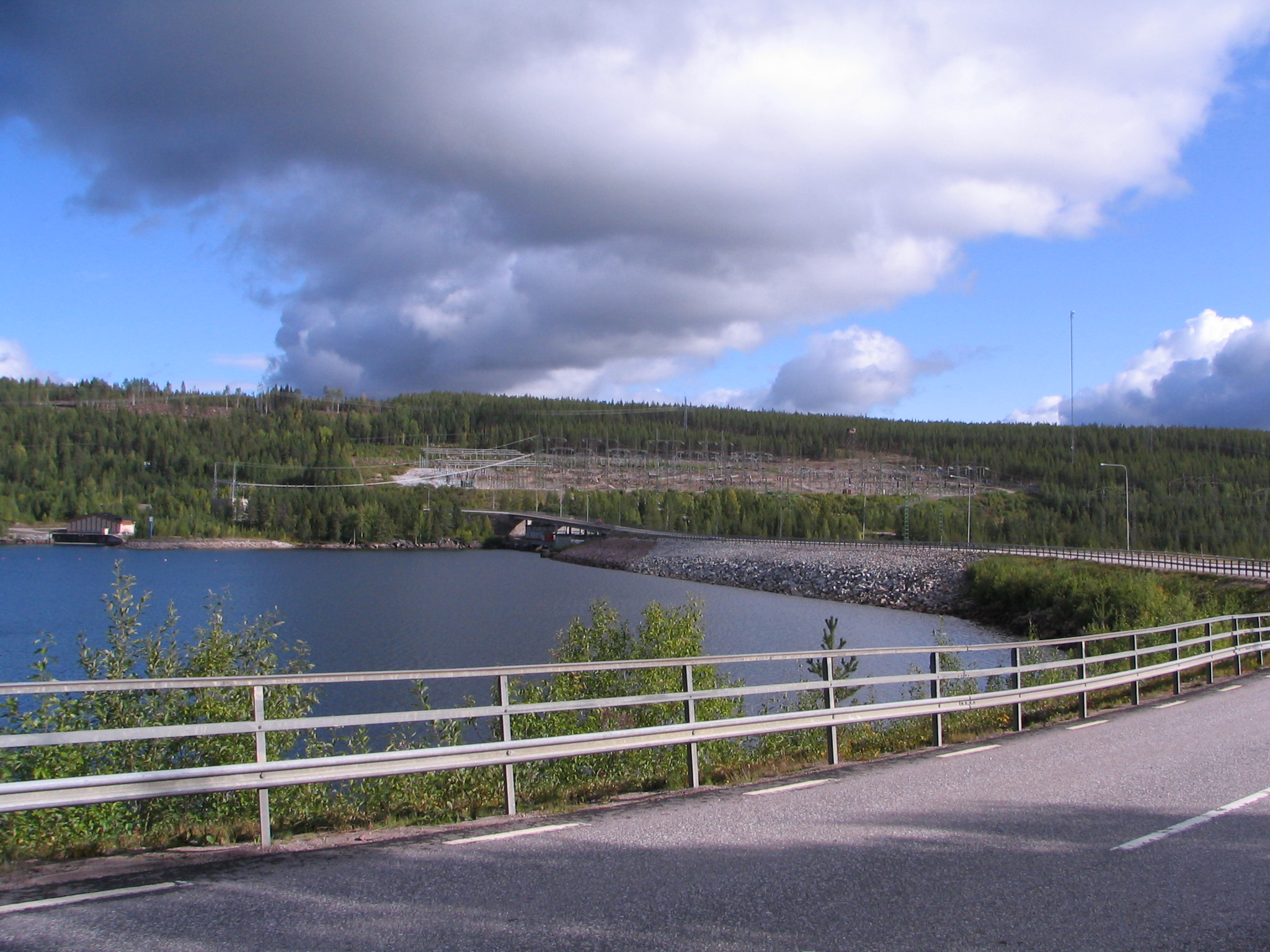 Ligga kraftverk, Jokkmokks kommun, Sverige